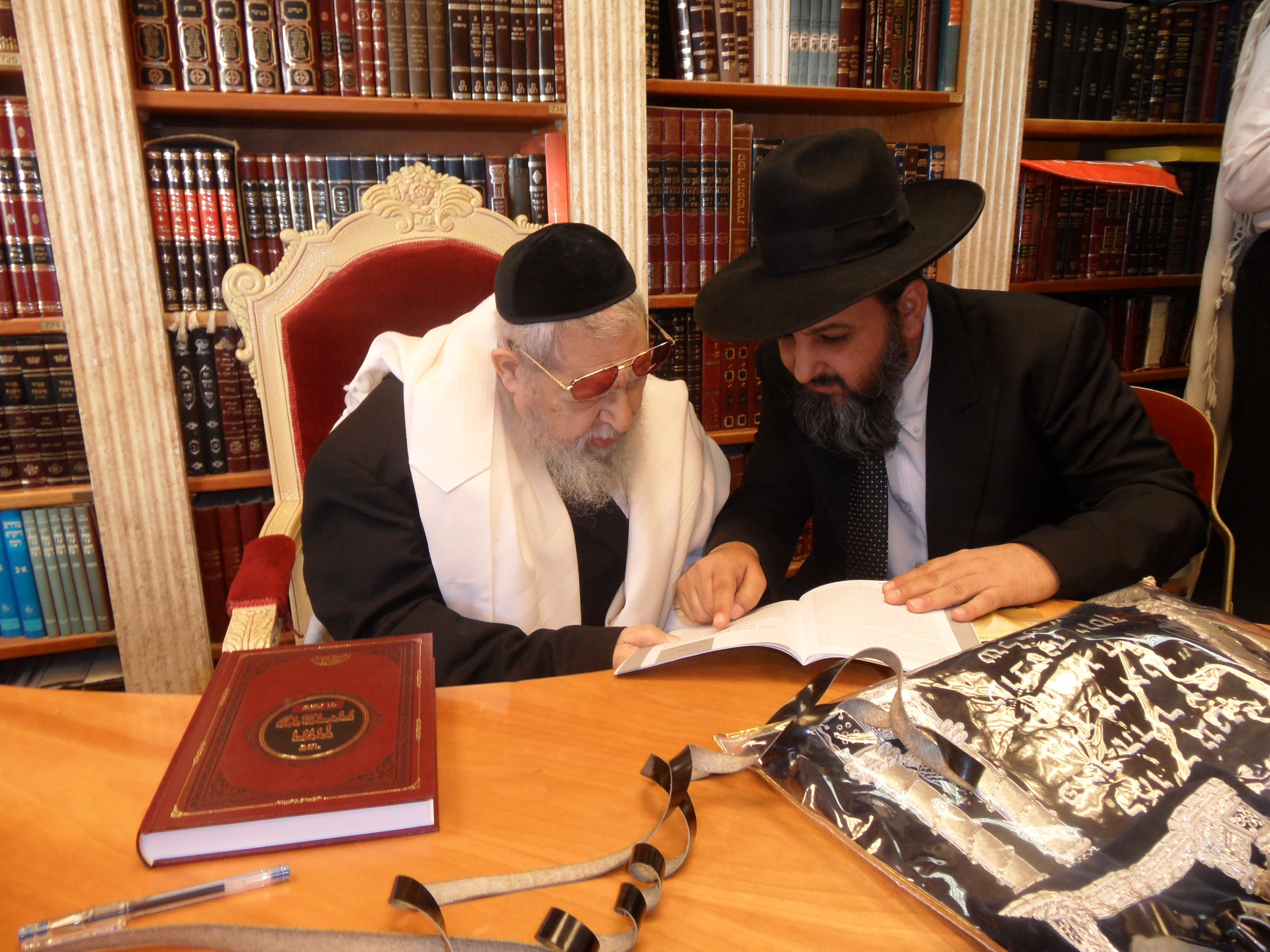 עיון בסוגיא יחד עם מרן רבינו עובדיה יוסף זצוקל